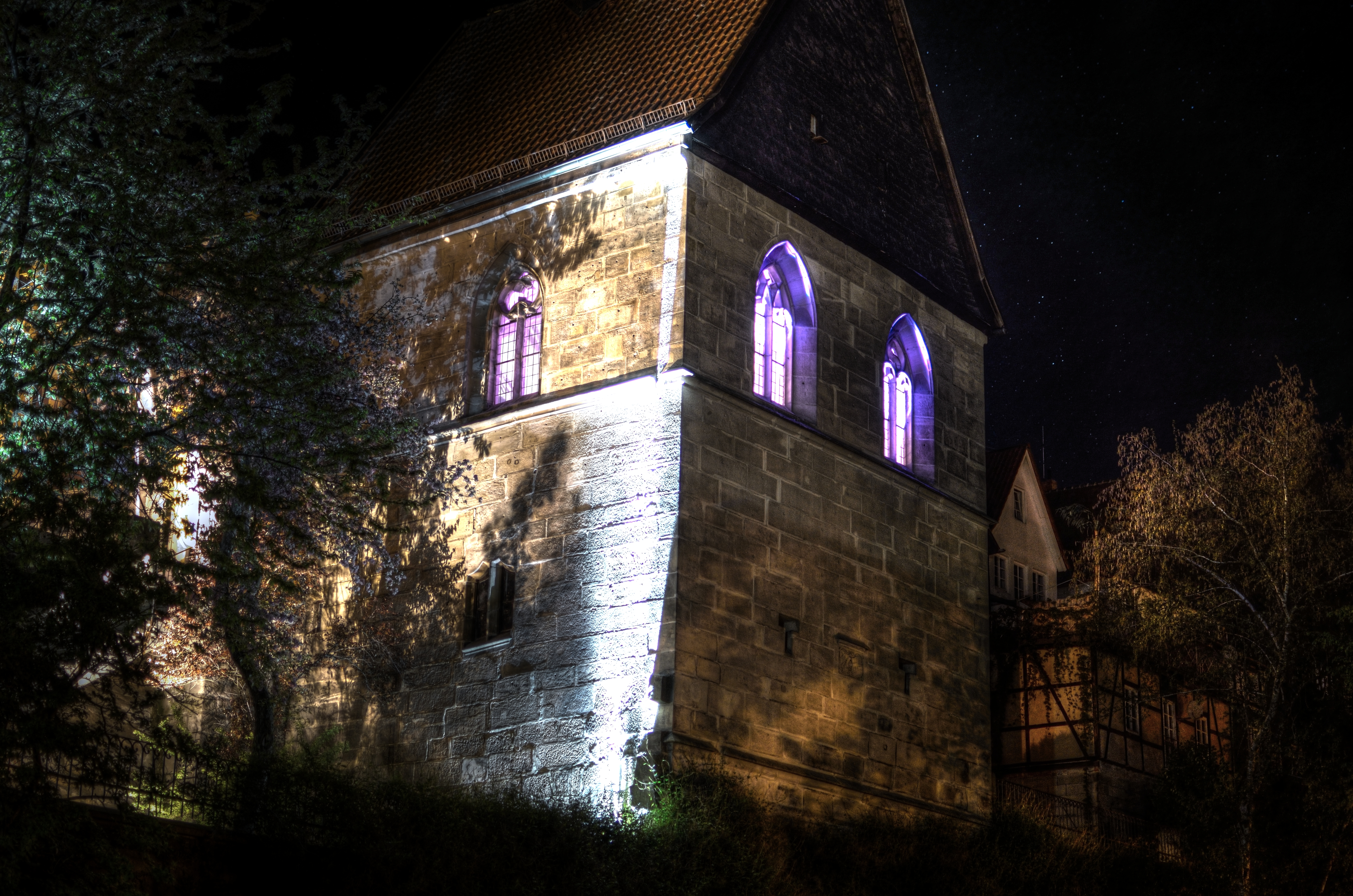 Pseudo HDR Kronach leuchtet 2013